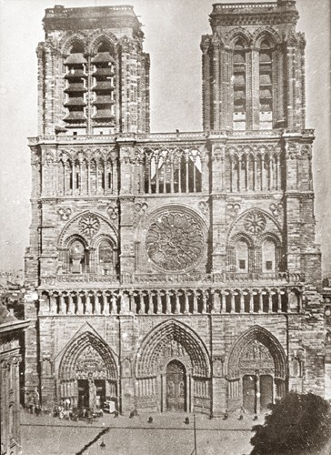 Notre-Dame de Paris en 1840, avant la restauration de Viollet-Le-Duc, daguerréotype de Noël Paymal Lerebours